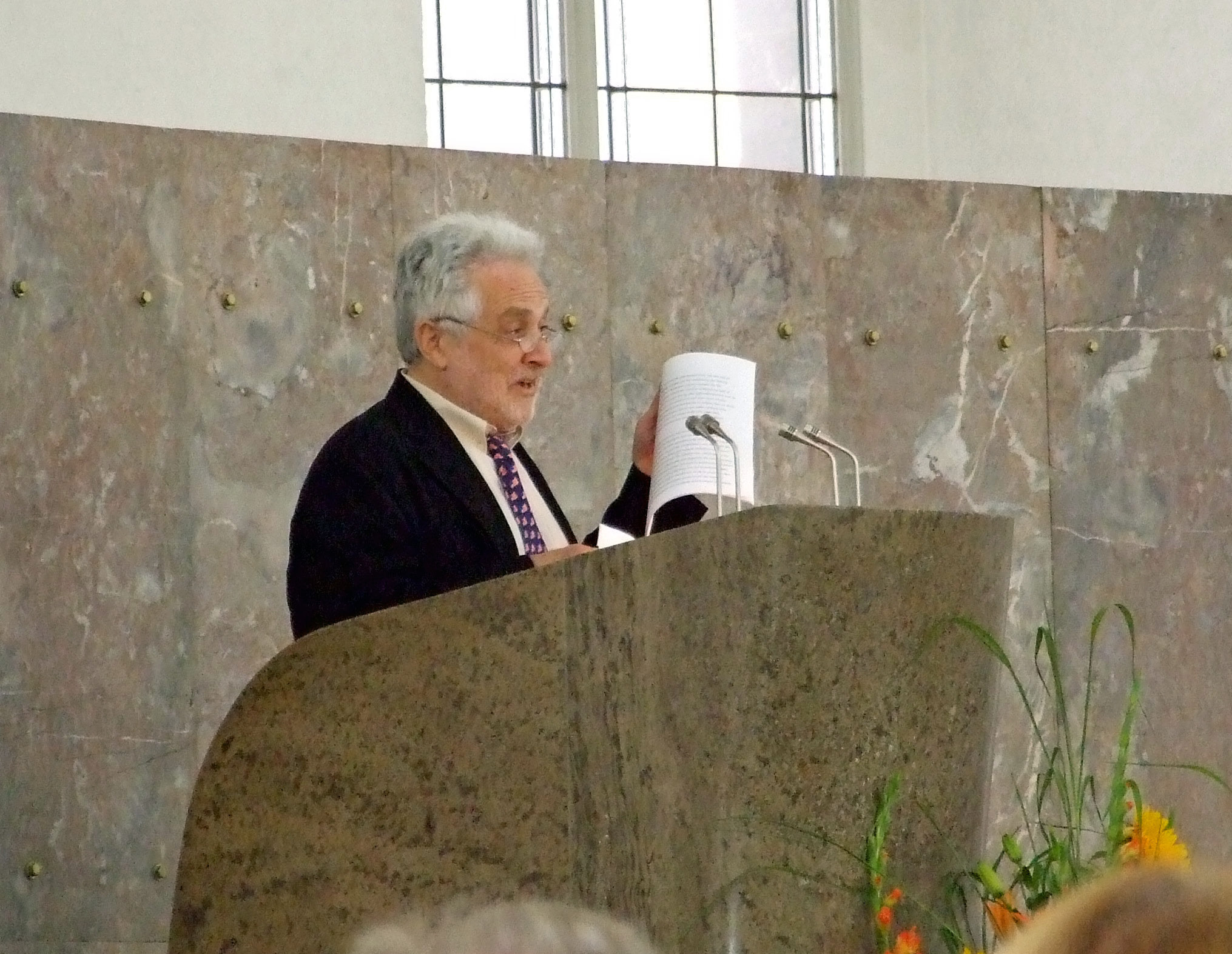 Henryk M. Broder, bei seiner (Dankes-)Rede in der Paulskirche 2007